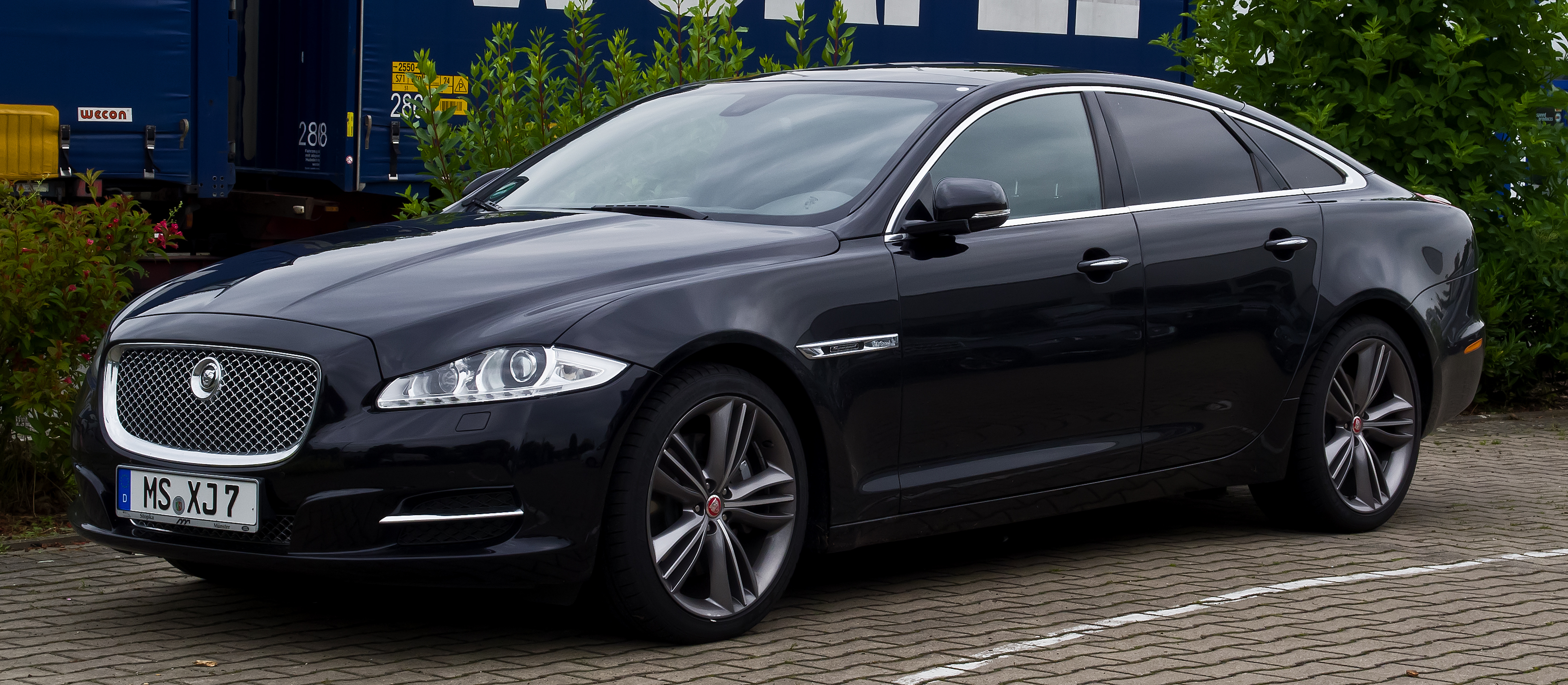 Jaguar XJ 3.0 D-S Supersport (X351)